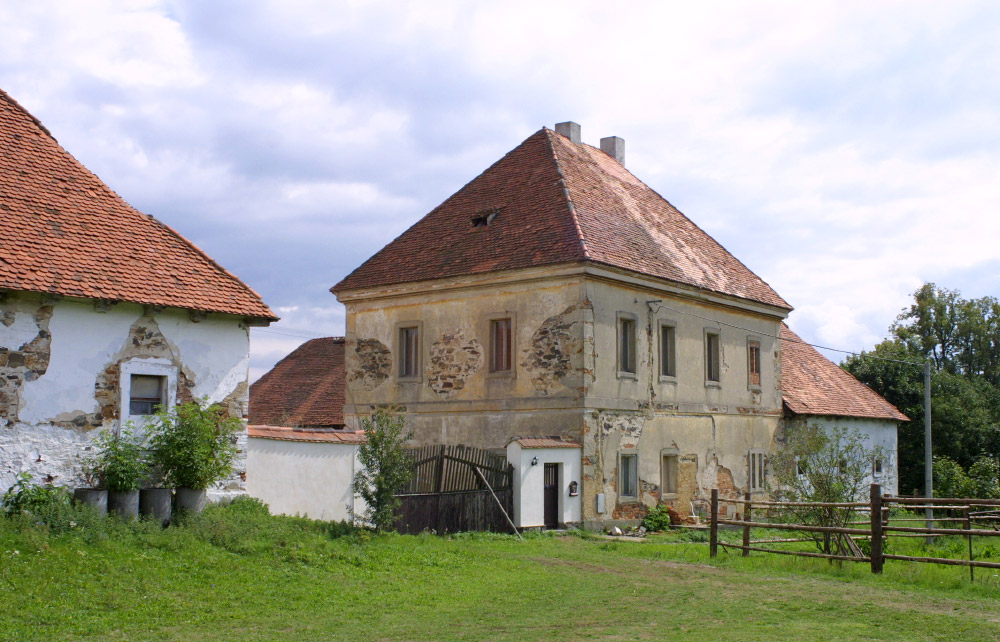 "Zámeček" barokního hospodářského dvora plaského kláštera, Lednice.